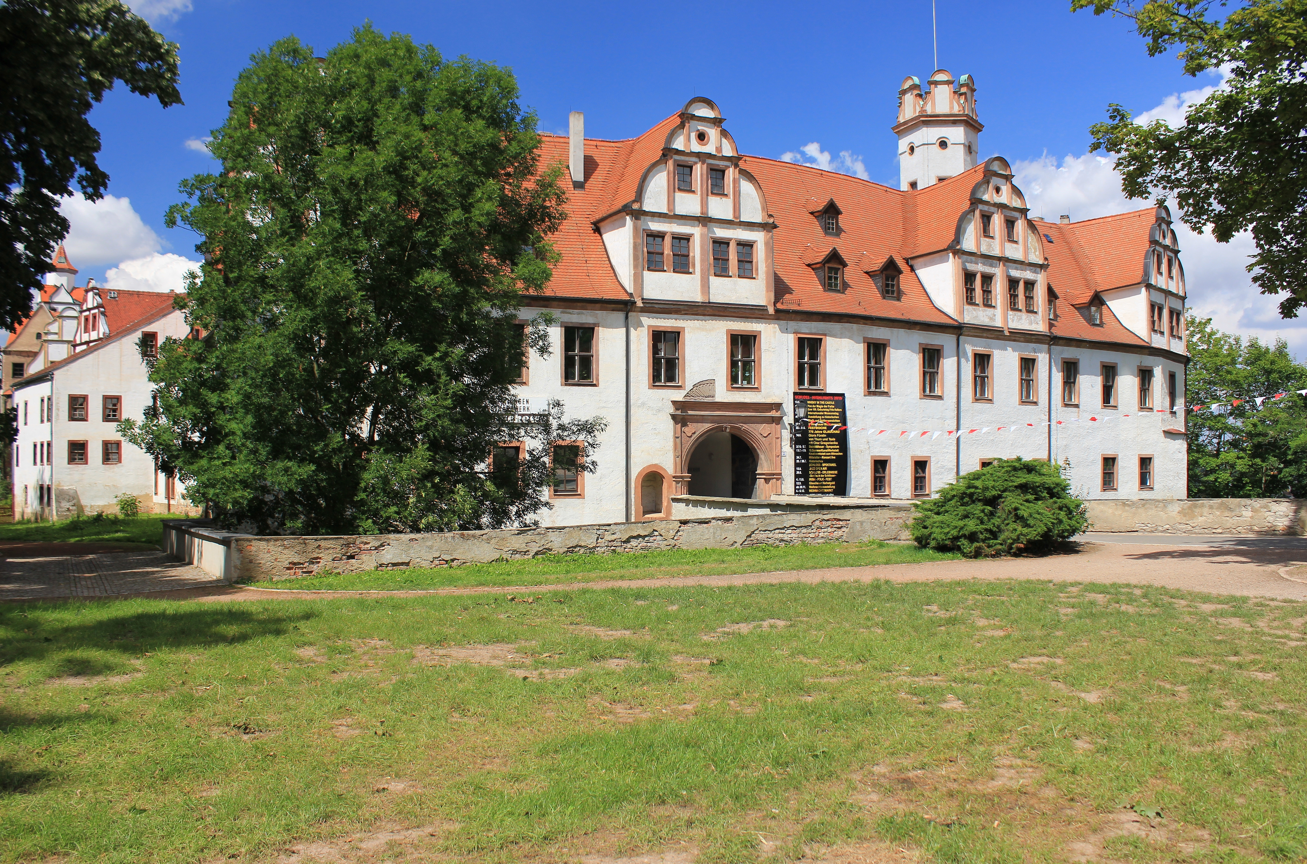 Schloss Glauchau in Glauchau. Sachsen.